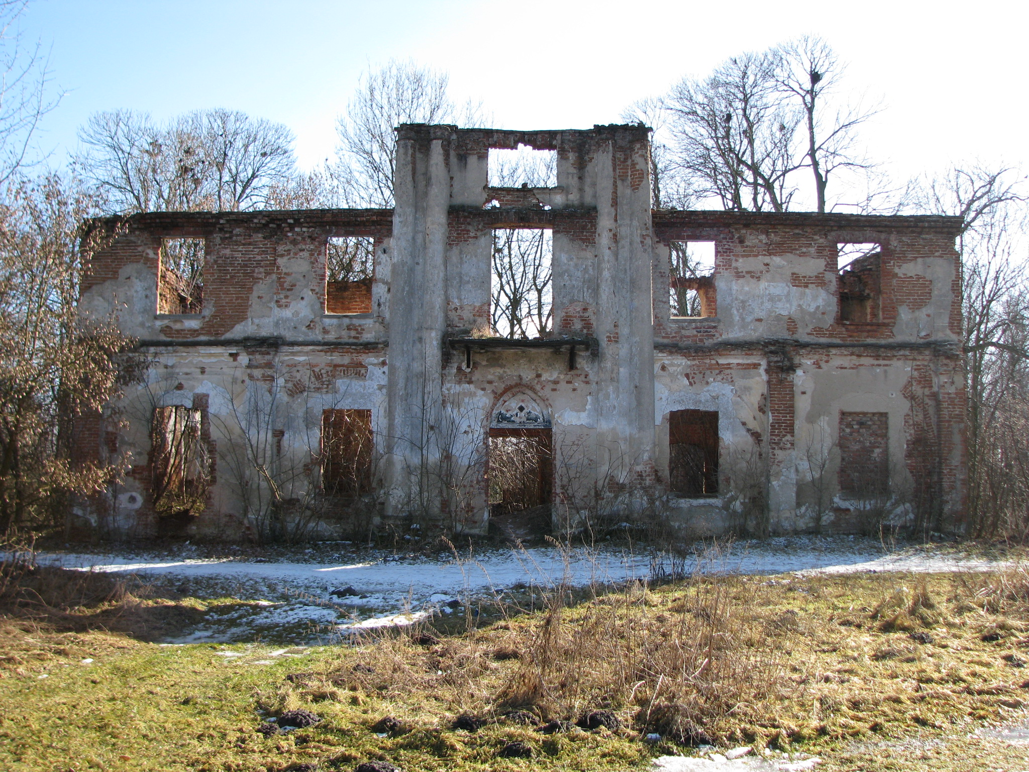 Szreńsk, pozostałości zamku gotyckiego, pałac z około 1800 roku zbudowany w miejscu pierwotnego głównego budynku mieszkalnego zamku. Stan obecny - niezabezpieczona postępująca ruina